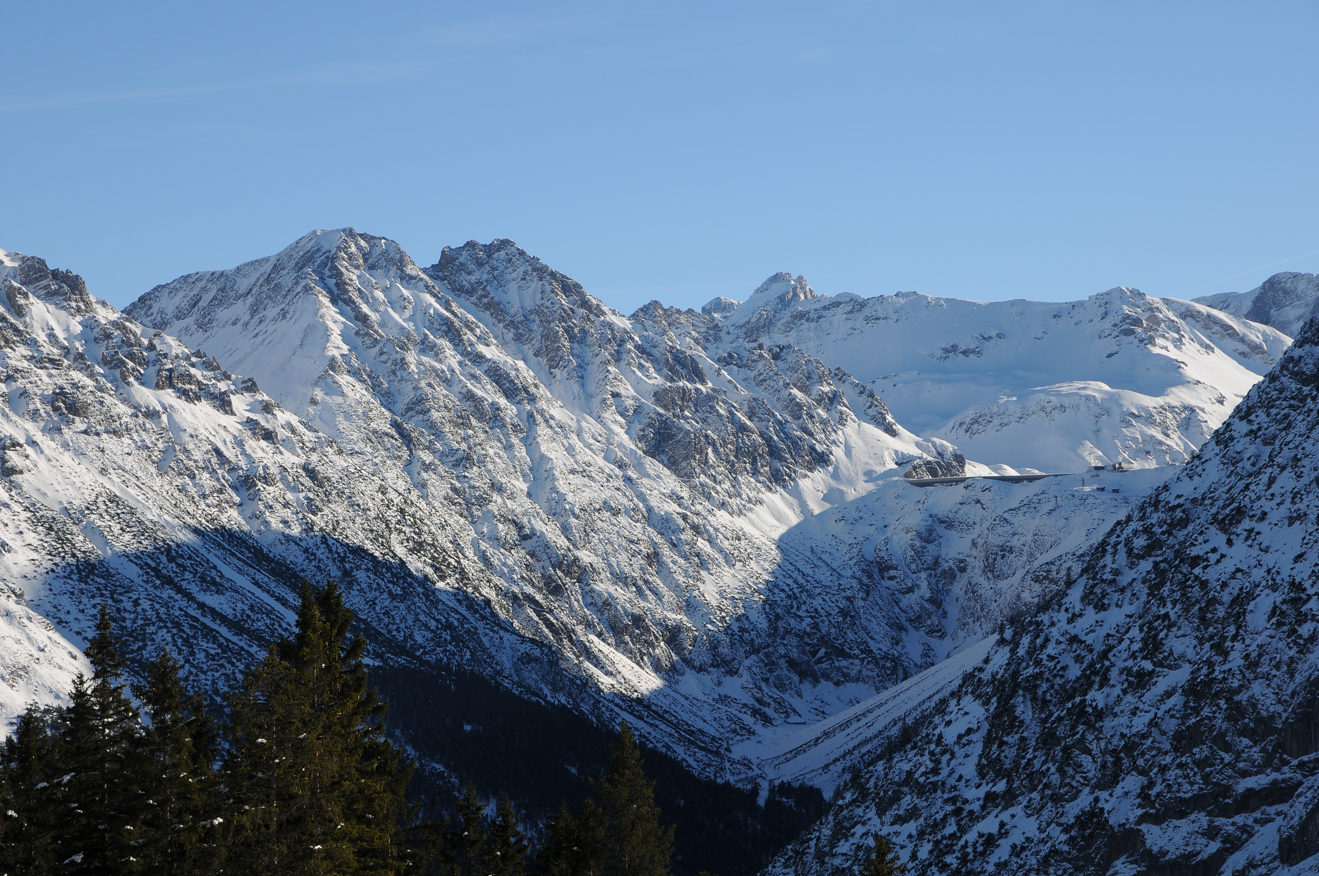 Zwischen der Bergstation Palüdbahn und der Talstation Glattjochbahn richtet sich der Blick in den Brandner Talabschluss, dem Lünersee. Links der Staudammkrone stehen die fast gleich hohen Berge, der Nördliche Schafgafall mit (2.393m) und daneben der Schafgafall mit 2.414m. Am Horizont, in der Bildmitte befinden sich die Gipfel der Drusenfluh 2.827m und der Drei Türmen 2.830m.